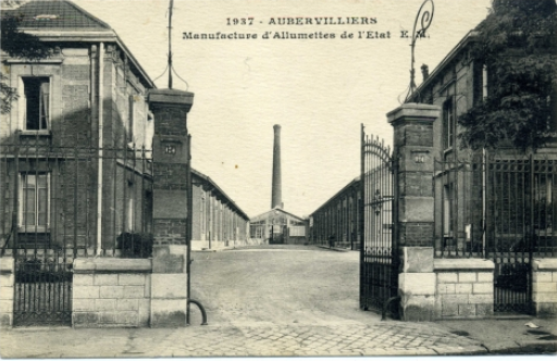 La Manufacture d'Allumettes à Aubervilliers